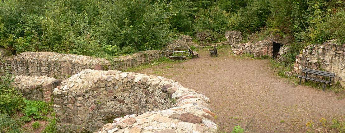 Baureste im Innenhof Burg Löwenstein